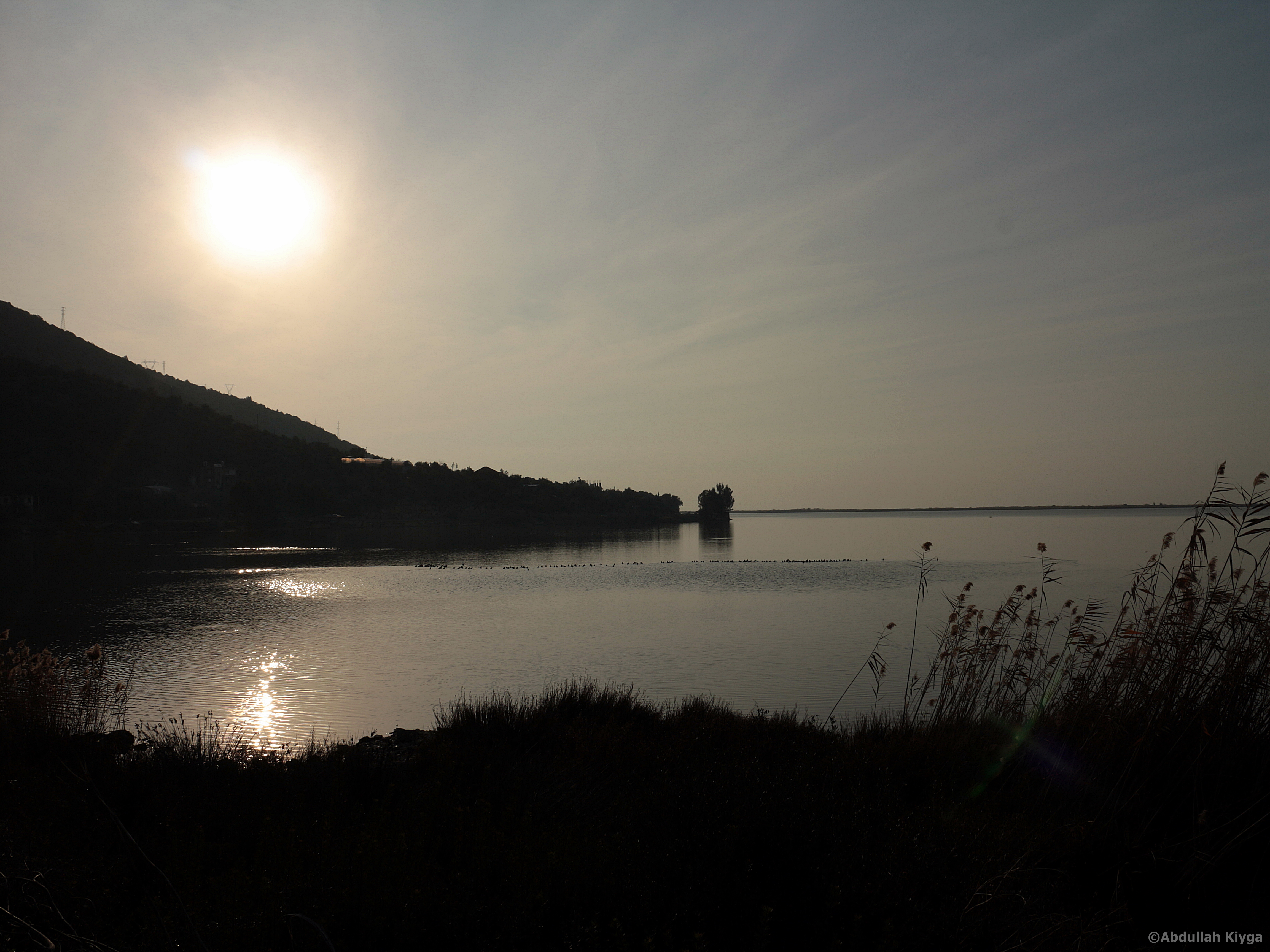 Beymelek lake, Demre, Antalya ©Abdullah Kiyga